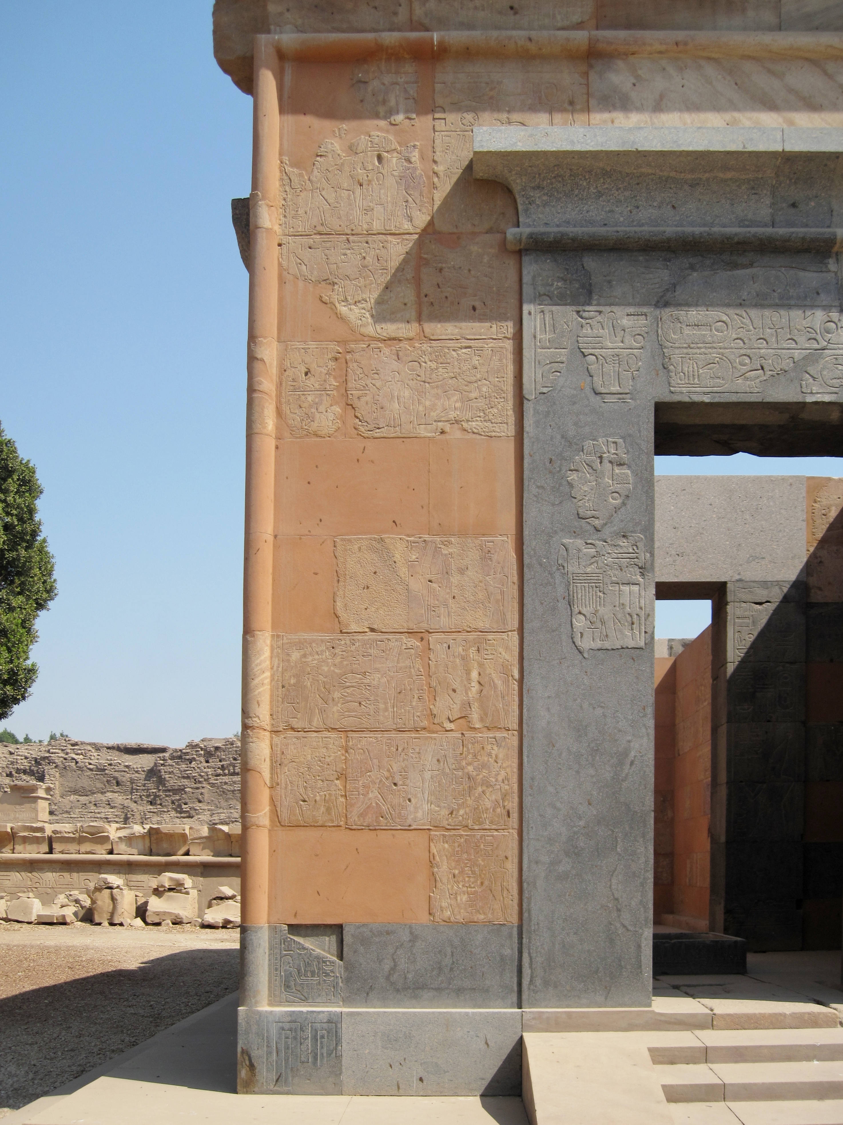 Linke Frontseite der im Jahr 2000 wiedererrichteten Roten Kapelle der Hatschepsut im Freilichtmuseum von Karnak, nördlich von Luxor, Ägypten